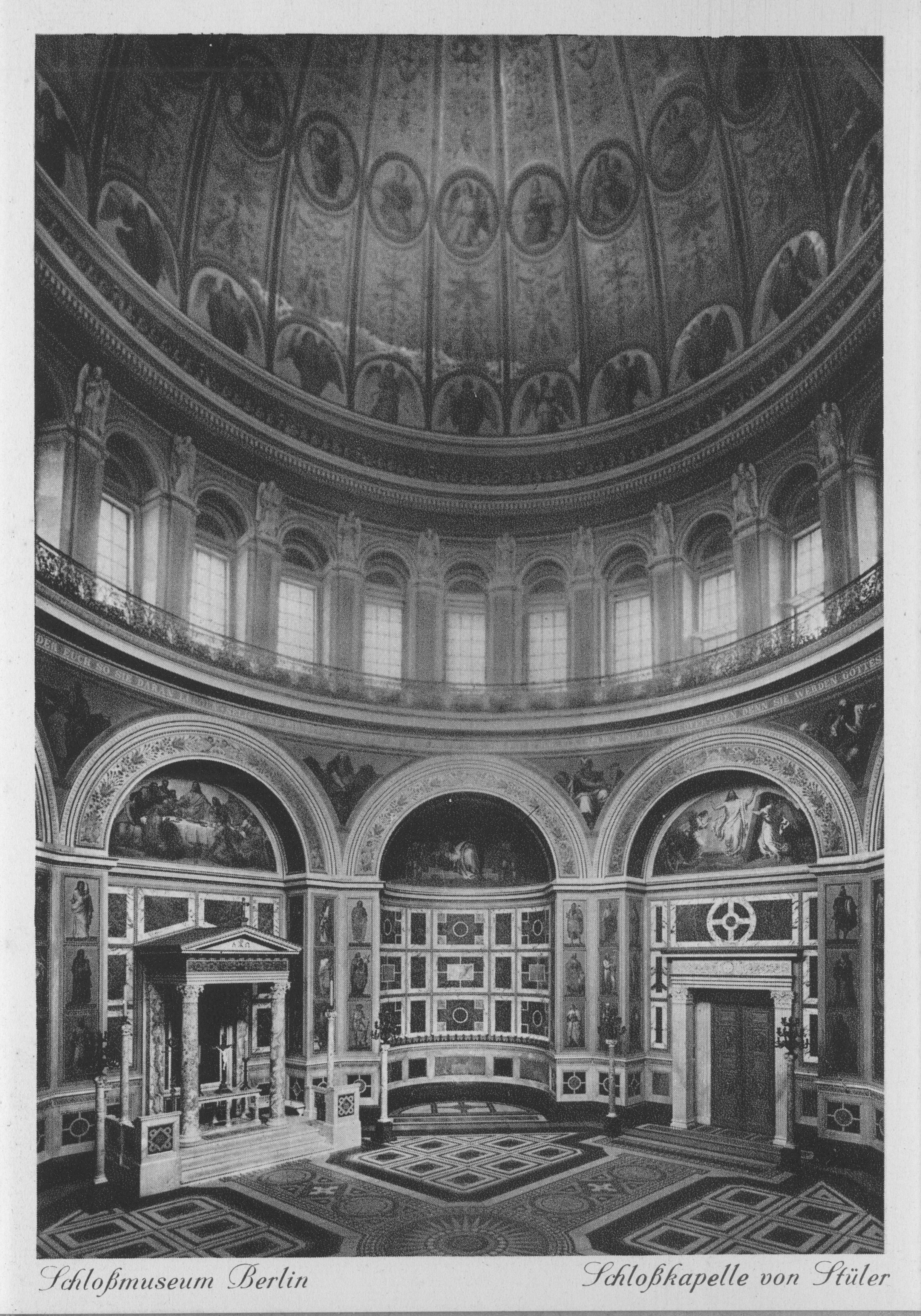 Schloßmuseum / Stadtschloss Berlin